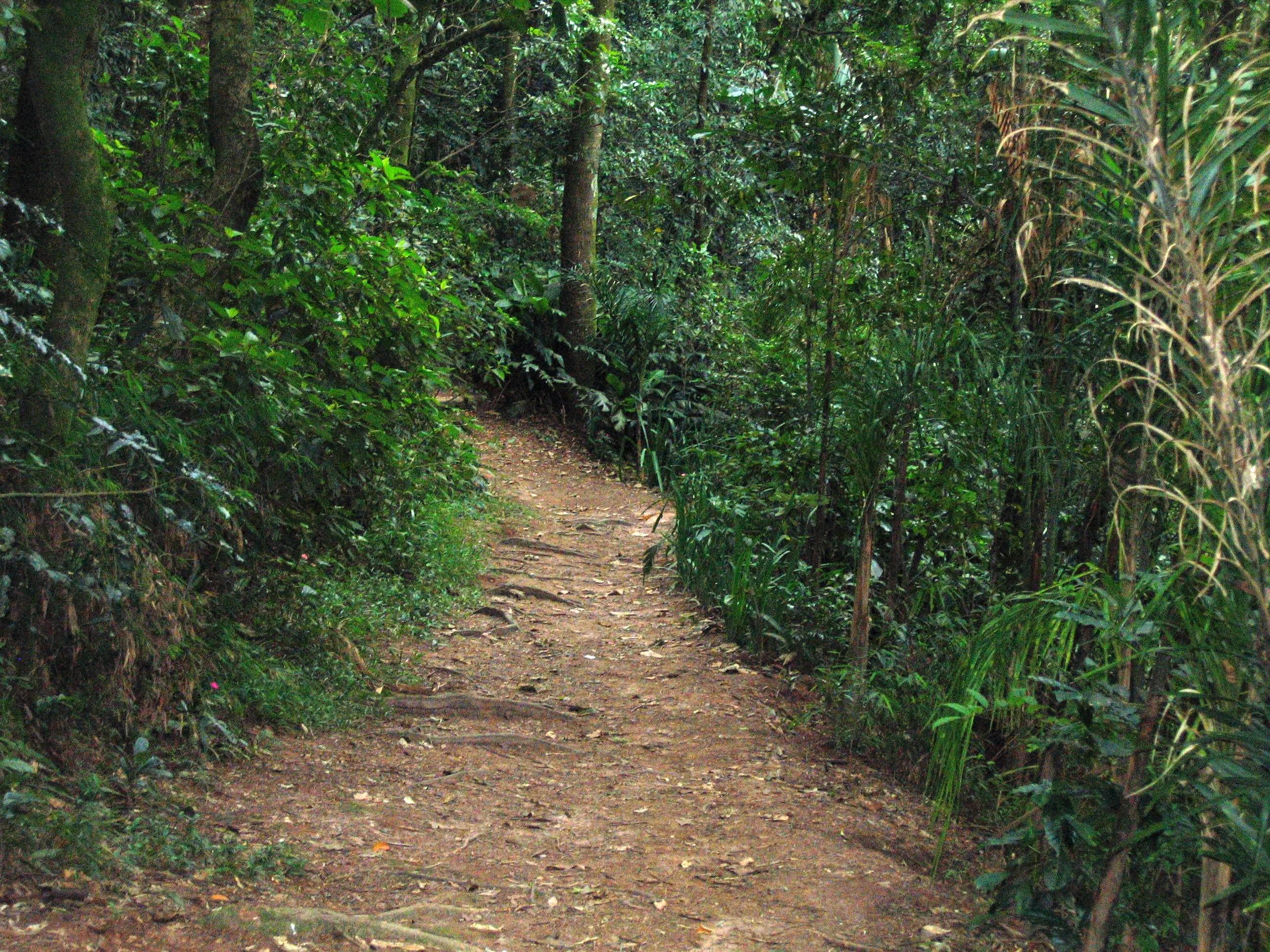 Trilha do Jequitibá situada no Parque Previdência no município de São Paulo